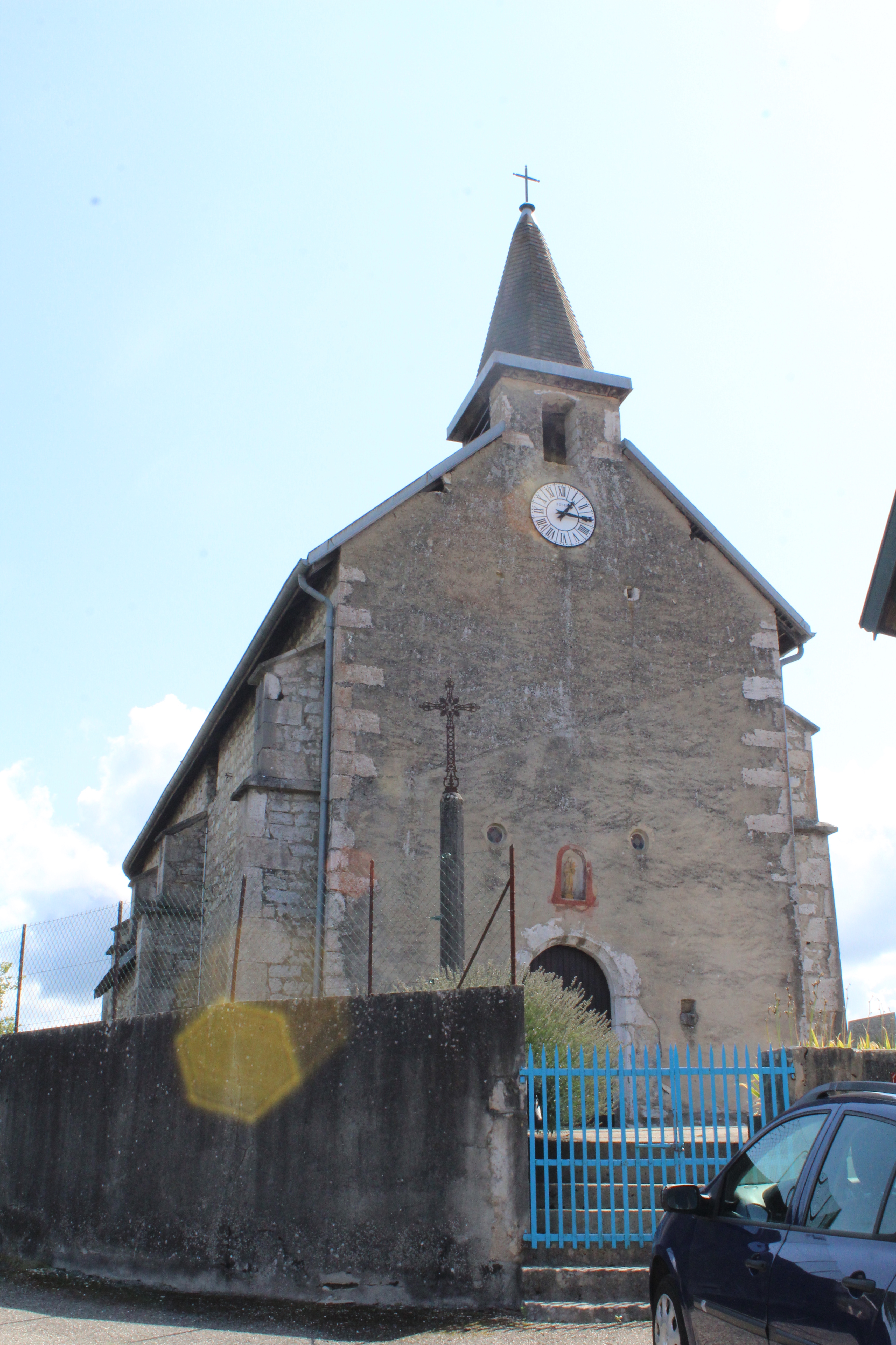 Église de Chatonod, Saint-Champ-Chatonod.